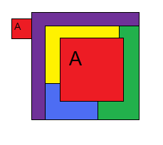 四色定理中的特例